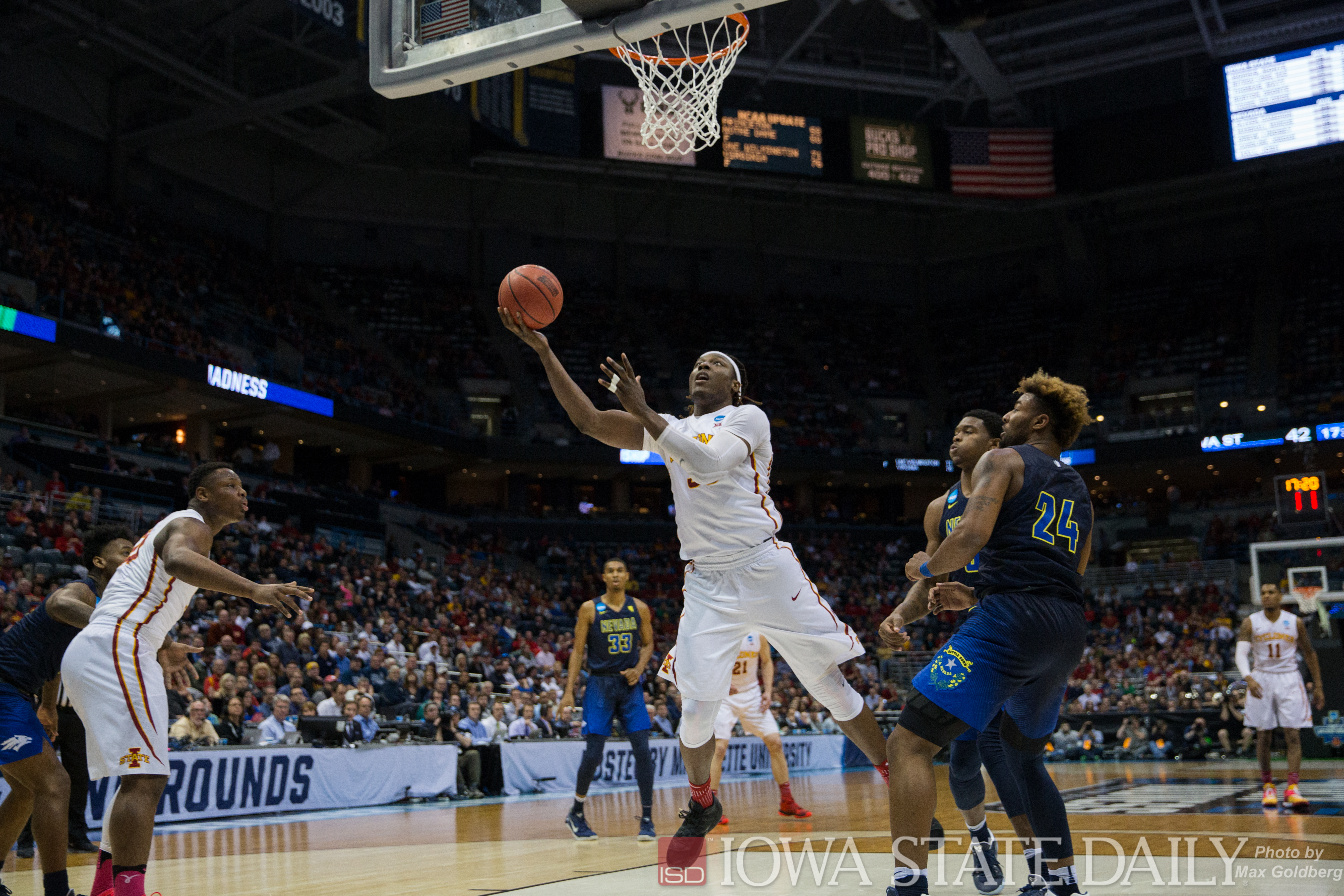 ISU vs Nevada